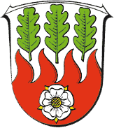 Wappen von Breuna